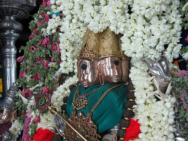 தமிழ்க் கடவுள் எனப் போற்றப்படும் முருகப் பெருமான் குன்றக்குடியில் சண்முகநாதப் பெருமான் என்னும் பெயரில் வீற்றிருந்து அருள்பாலிக்கிறார். அத்தெய்வத்தின் அழகிய படம்.